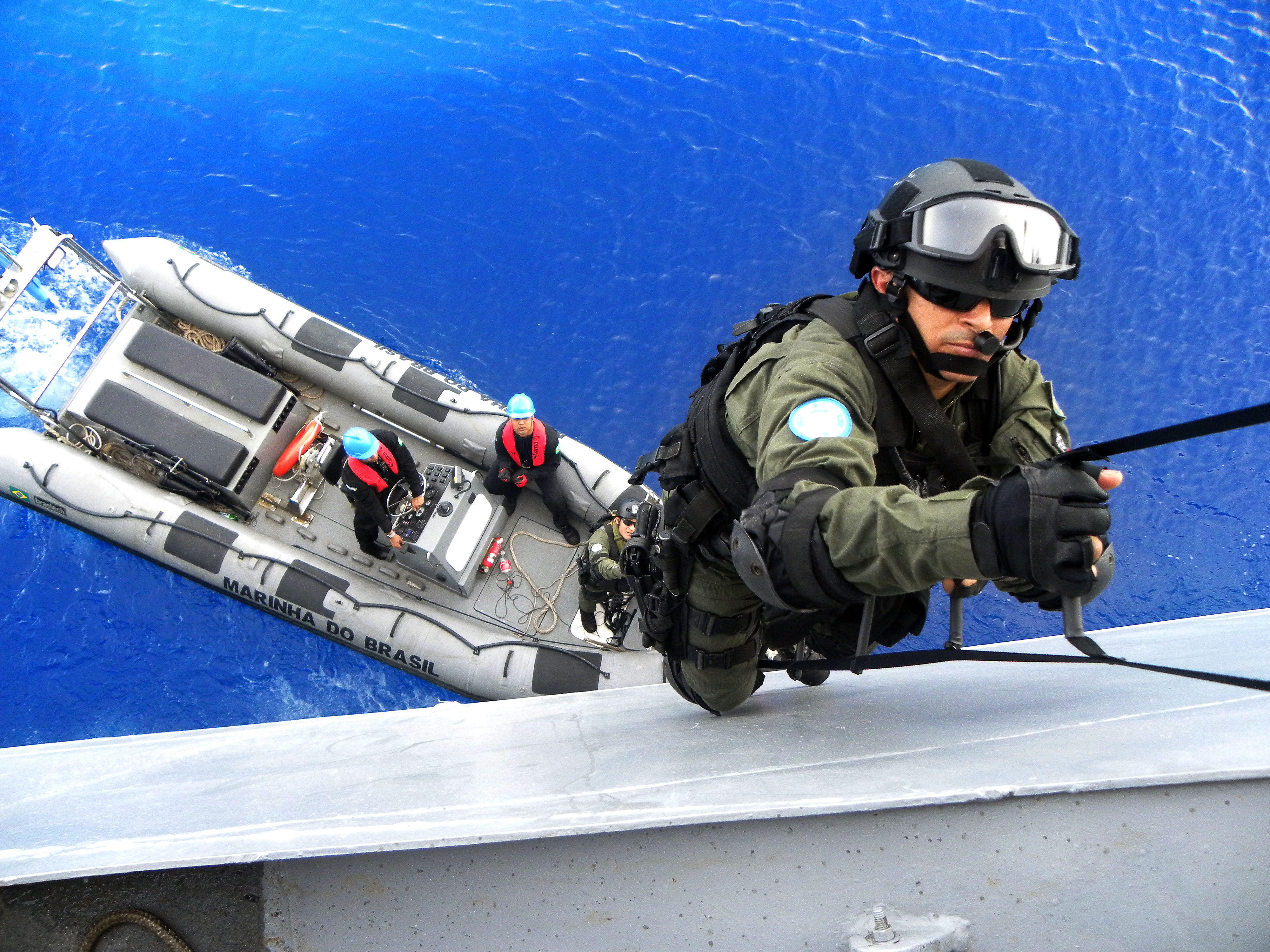 Foto: Marinha do Brasil